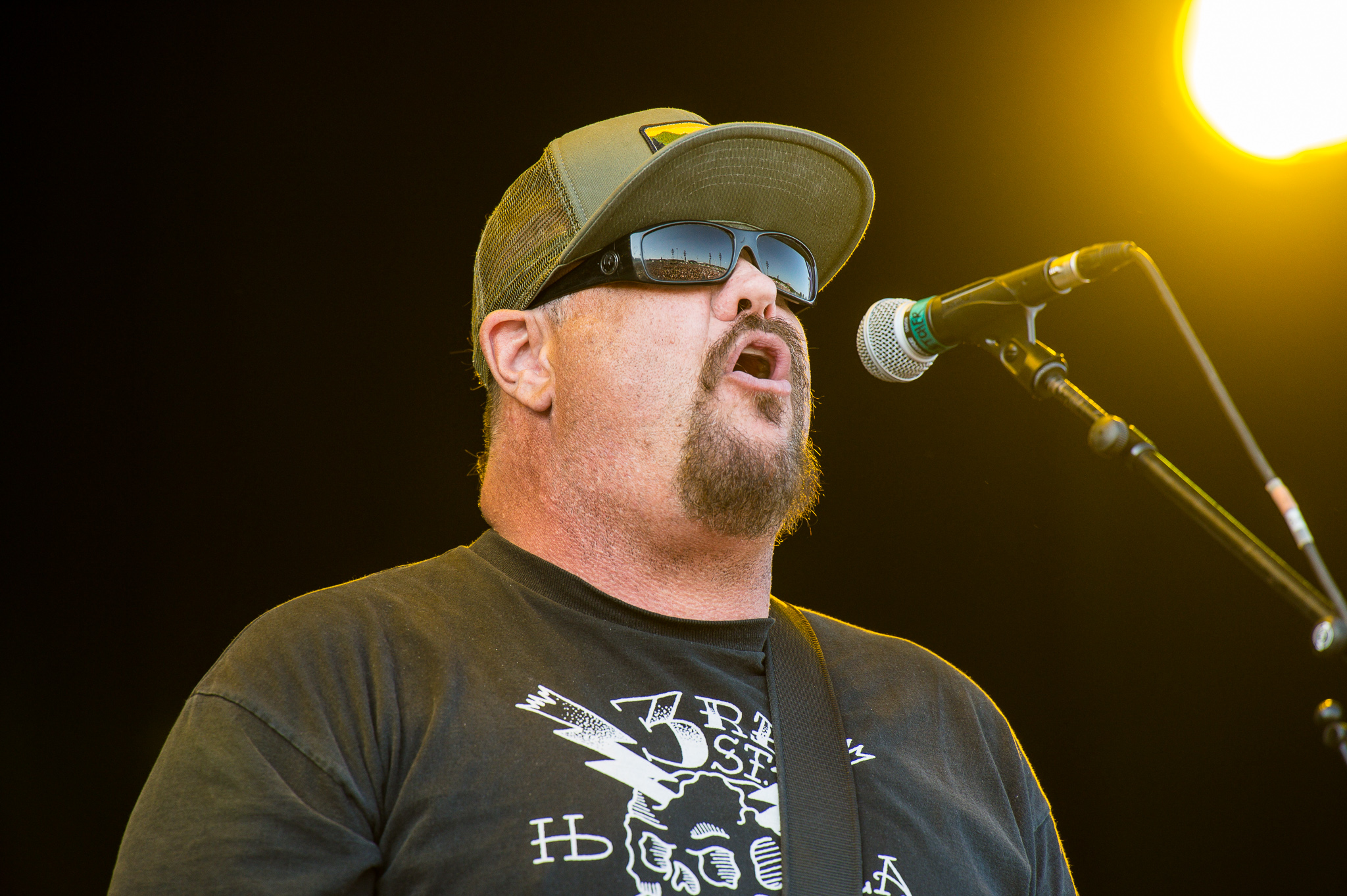 ARGO-Konzerte,Centerstage,Fletcher Dragge,Konzert,Livekonzert,Livemusik,Musik,Pennywise,RiP,Rock im Park 2014